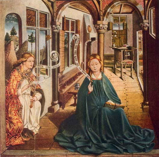 naam auteur : het is een Duitse schilder (Meister von Iserlohn) 'Master of Iserlohn' naam kunstwerk : 'Annunciation'